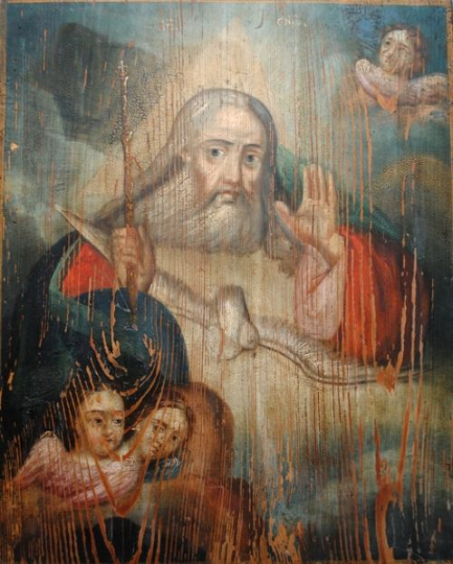 Музей: Беларускі дзяржаўны музей народнай архітэктуры і побыту Тып: выяўленчыя крыніцы Від: жывапіс Прадметнае імя: абраз Назва/аўтарская назва: "Бог Айцец" Матэрыялы: дрэва; Тэхналогіі стварэння: алей; Дата стварэння: 1850-1899 гг. Месца стварэння: Беларусь, Гомельская вобласць, Брагінскі раён, в. Спярыжжа Памеры: 52,5 Х 42,4 Х 1,8